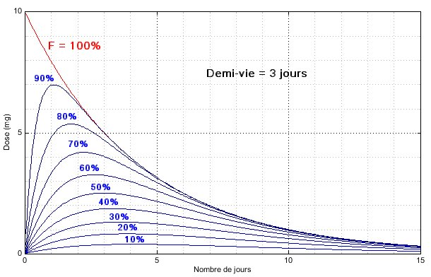 Evolution de la concentration en fonction de la biodisponibilité